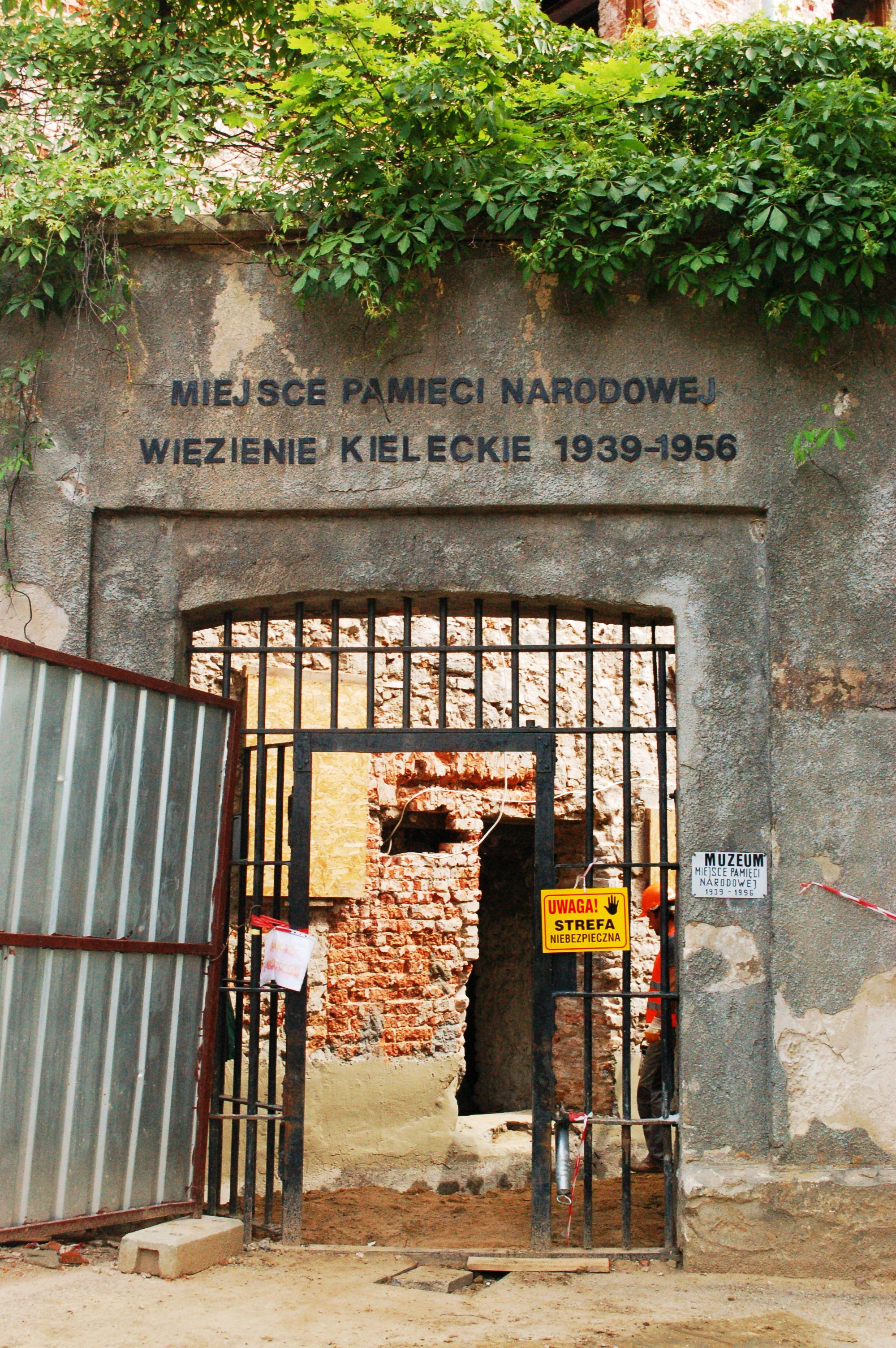 altes gefängnis KIelce